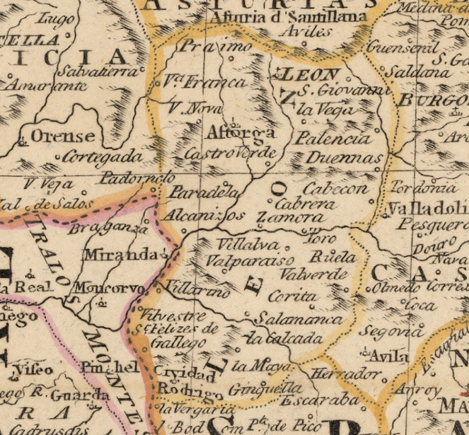 Detalle del Reino de León en el mapa "A new and accurate map of Spain and Portugal", realizado por Thomas Bowen en 1770